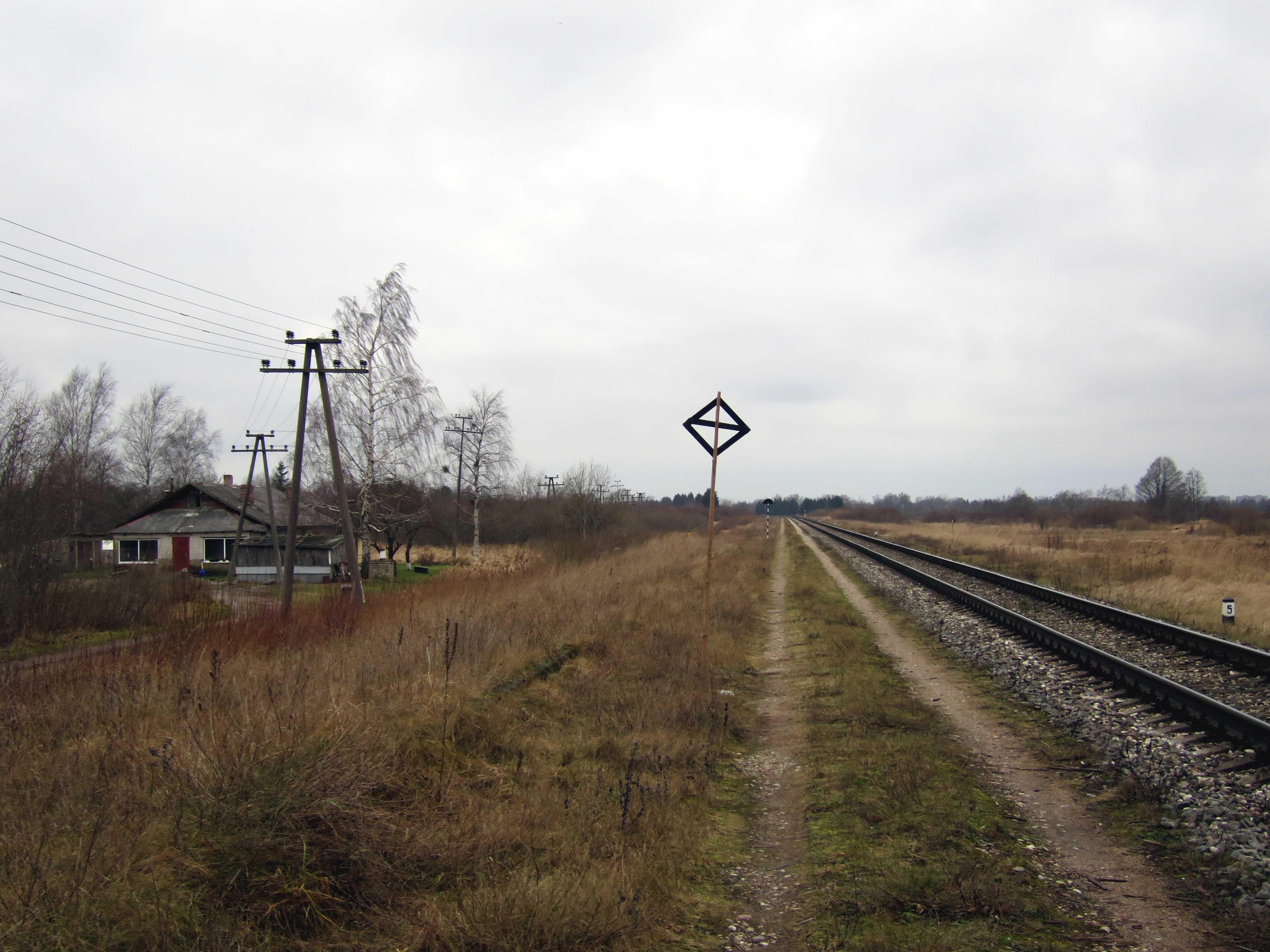 Ālandes stacijas atrašanās vieta, skats Liepājas virzienā